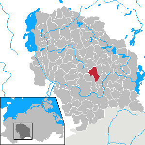 Granzin in Mecklenburg-Vorpommern - District Parchim